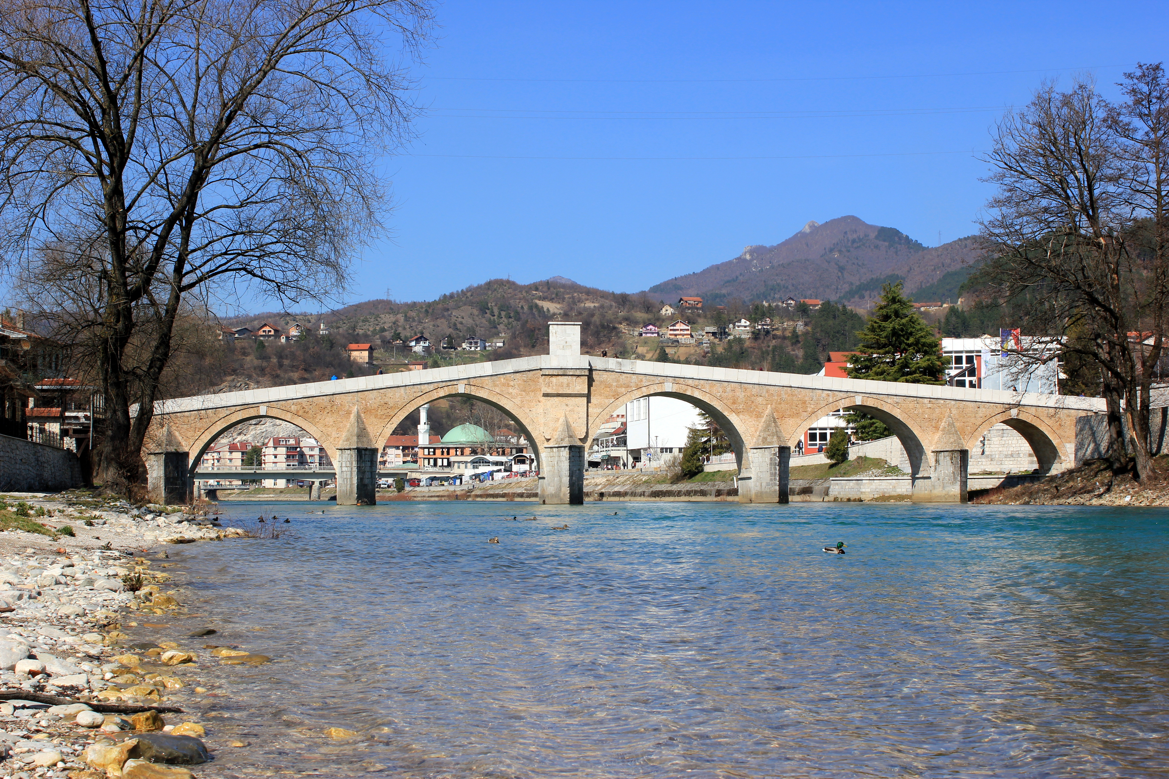 Die 2008 wieder aufgebaute osmanische Brücke über die Neretva in Konjic, Bosnien und Herzegowina.